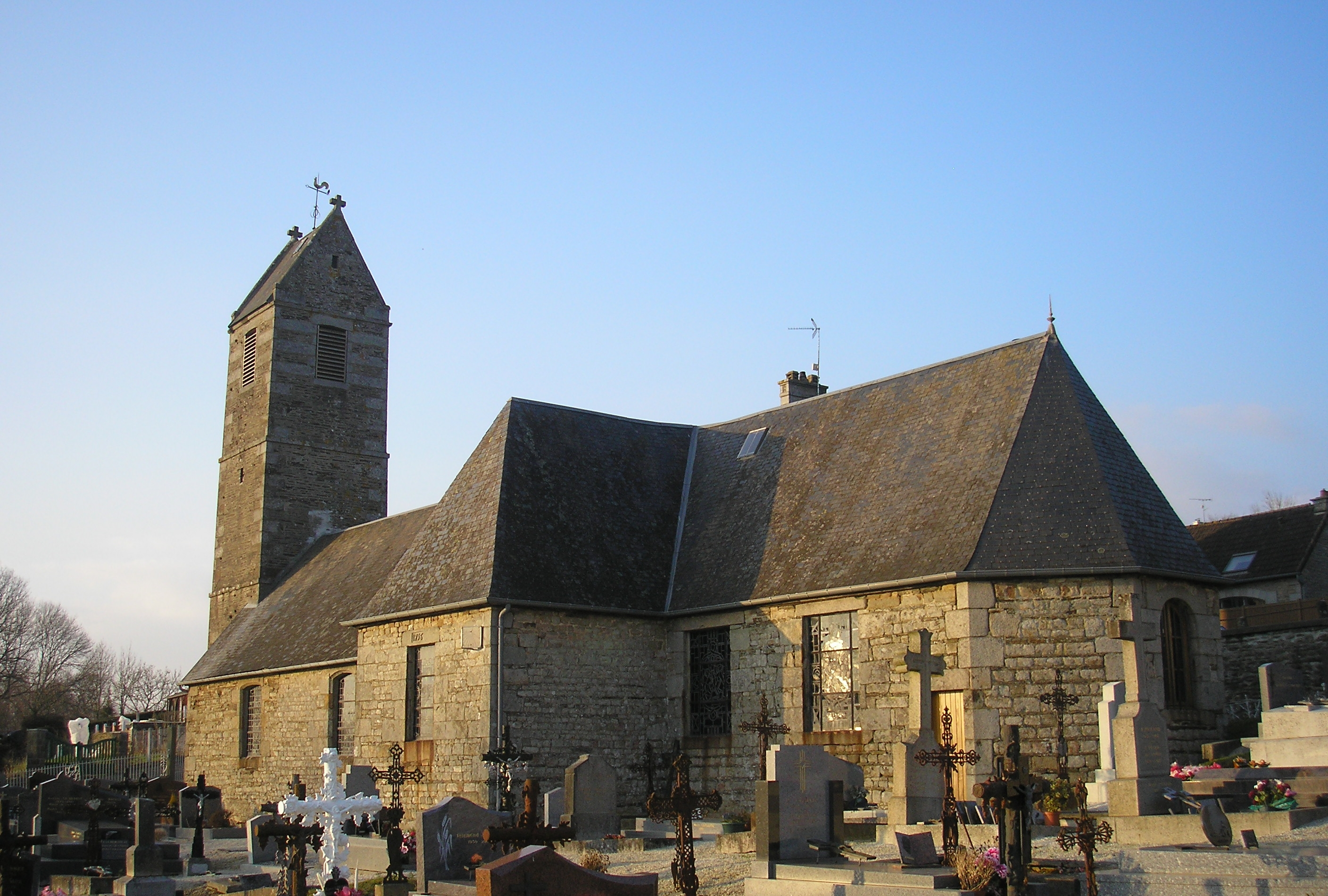 Brouains (Normandie, France). L'église Notre-Dame.